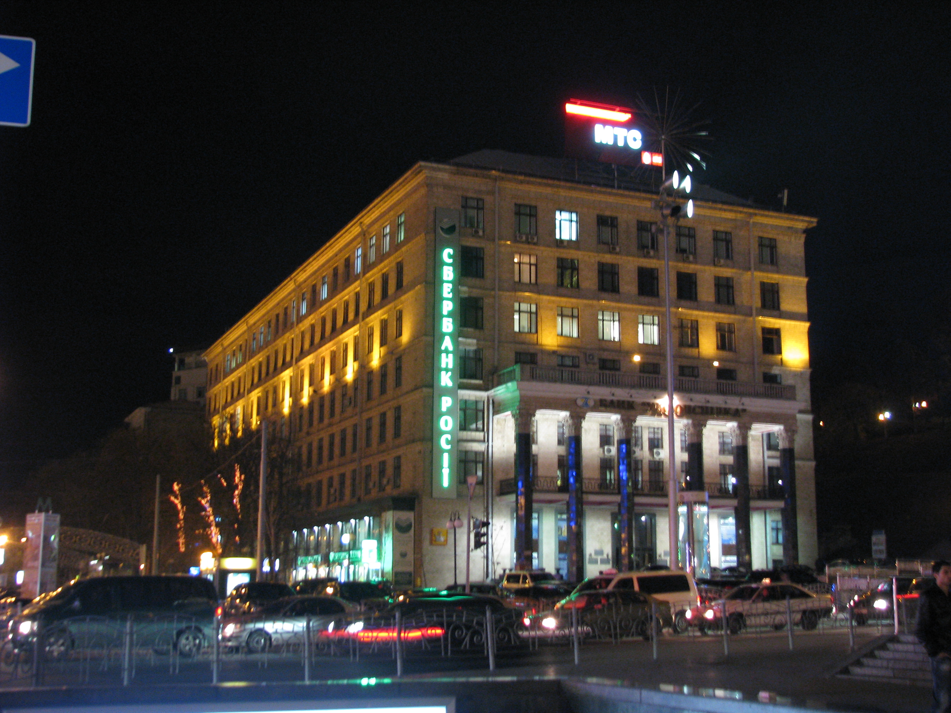 Главный офис Укоопсоюза (г. Киев, ул. Хрещатик 7\11)